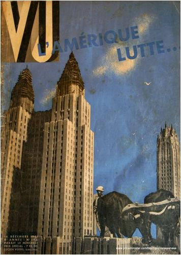 "L'Amérique en lutte", issue 01 01 1931, front cover with Manhattan from Vu, french weekly magazine (1928-1940).